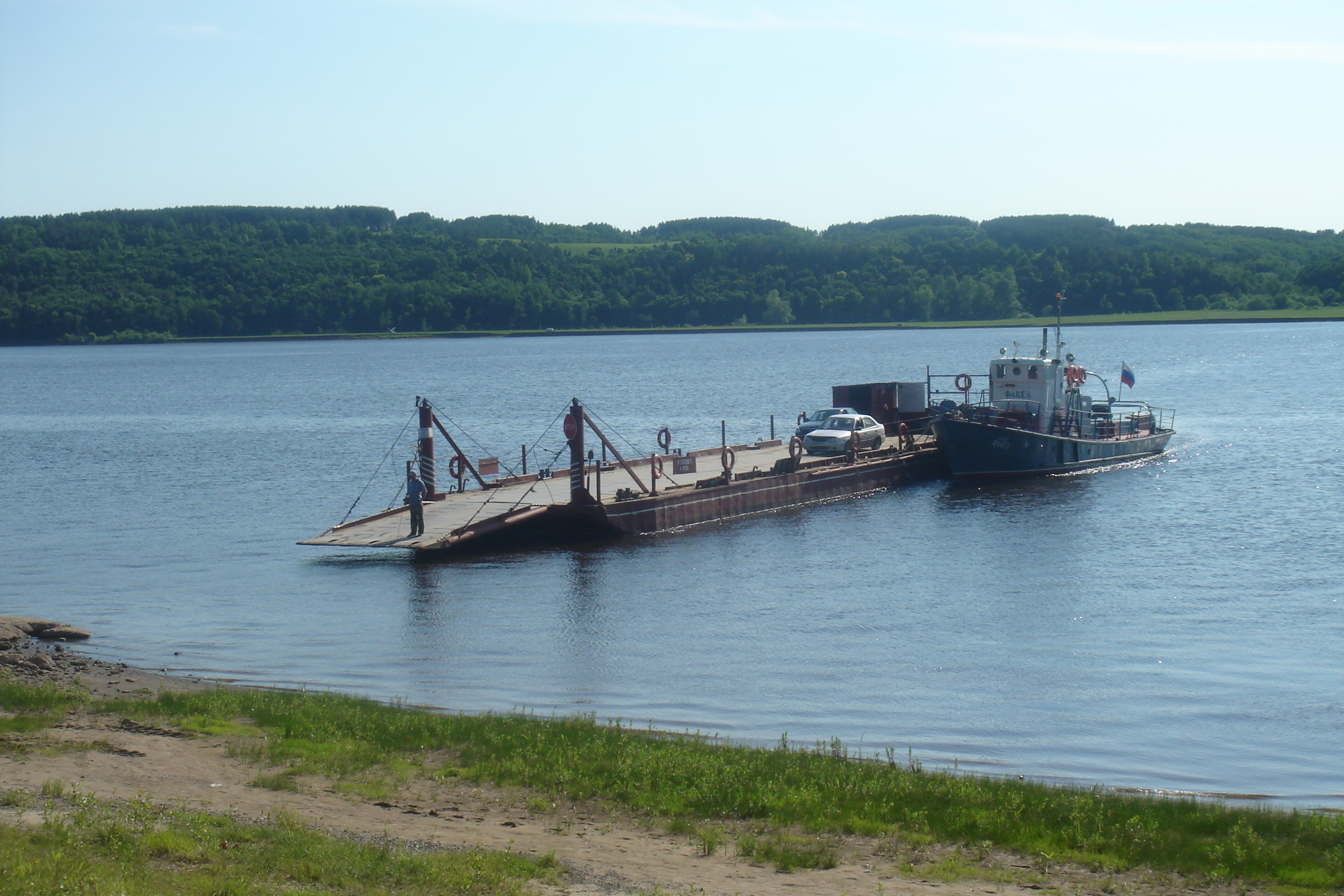 Камбарский паром.